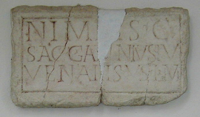 Abguss des Originals eines römischen Votivsteines in Donnersbach / Noricum